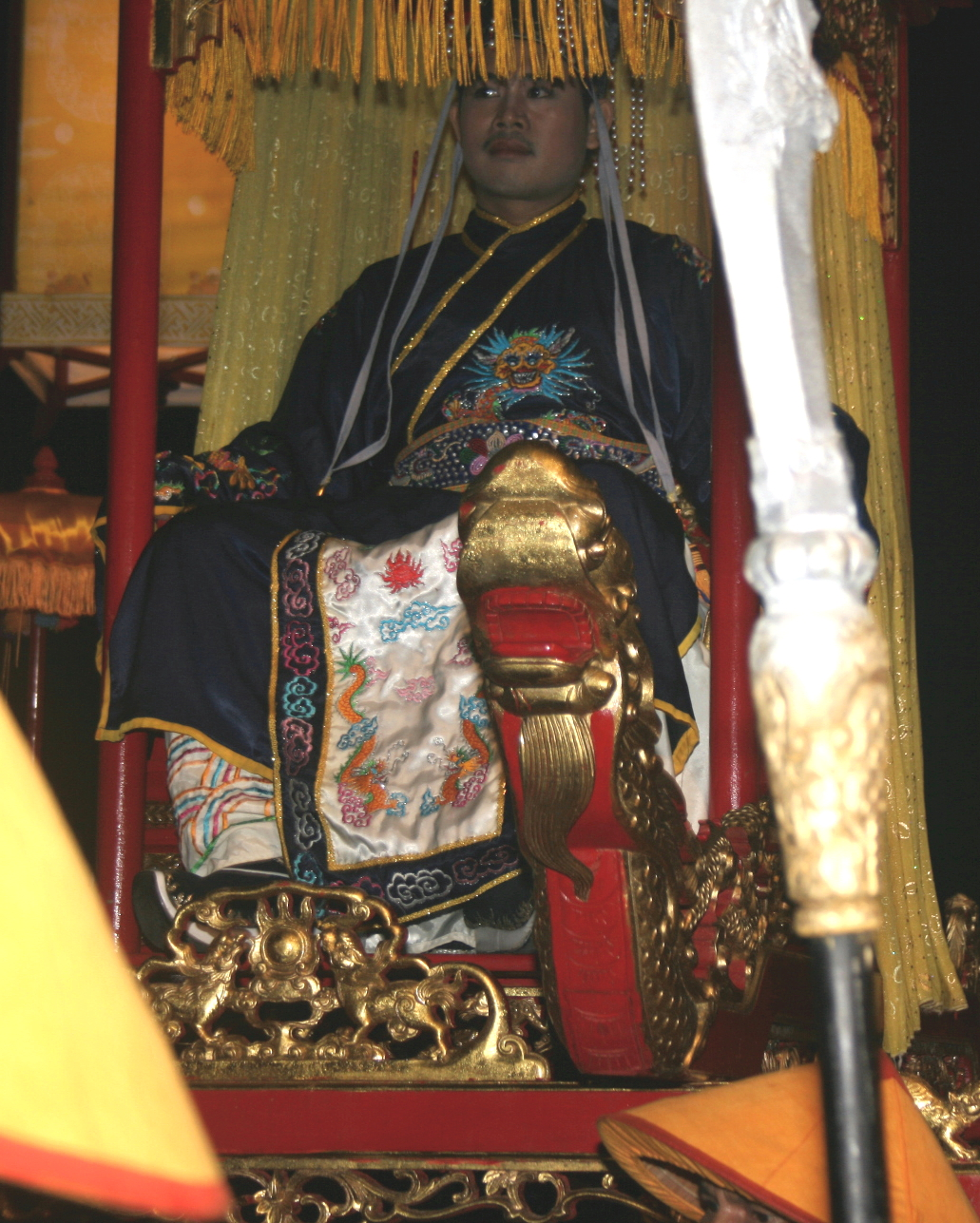 Tái tạo hình ảnh vua triều Nguyễn tại lễ tế đàn Nam Giao (Festival Huế 2008)